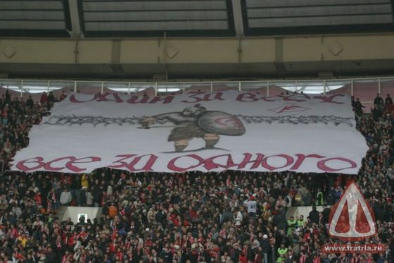 Баннер Один за всех на матче с Зенитом. 2005 год